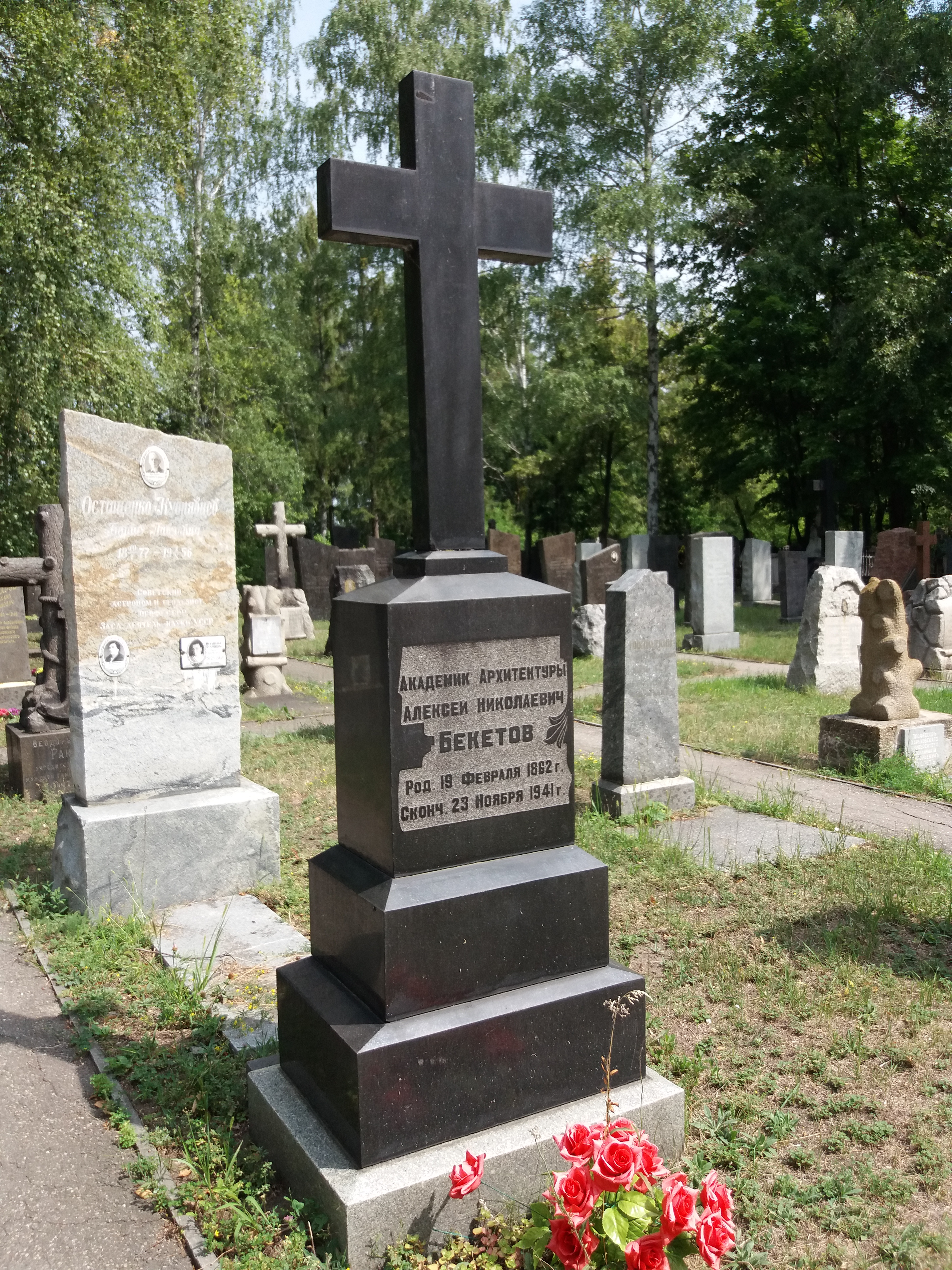 Могила Бекетова О.М., академіка архітектури, Харків, вул. Пушкінська, 108, 13-е міське кладовище